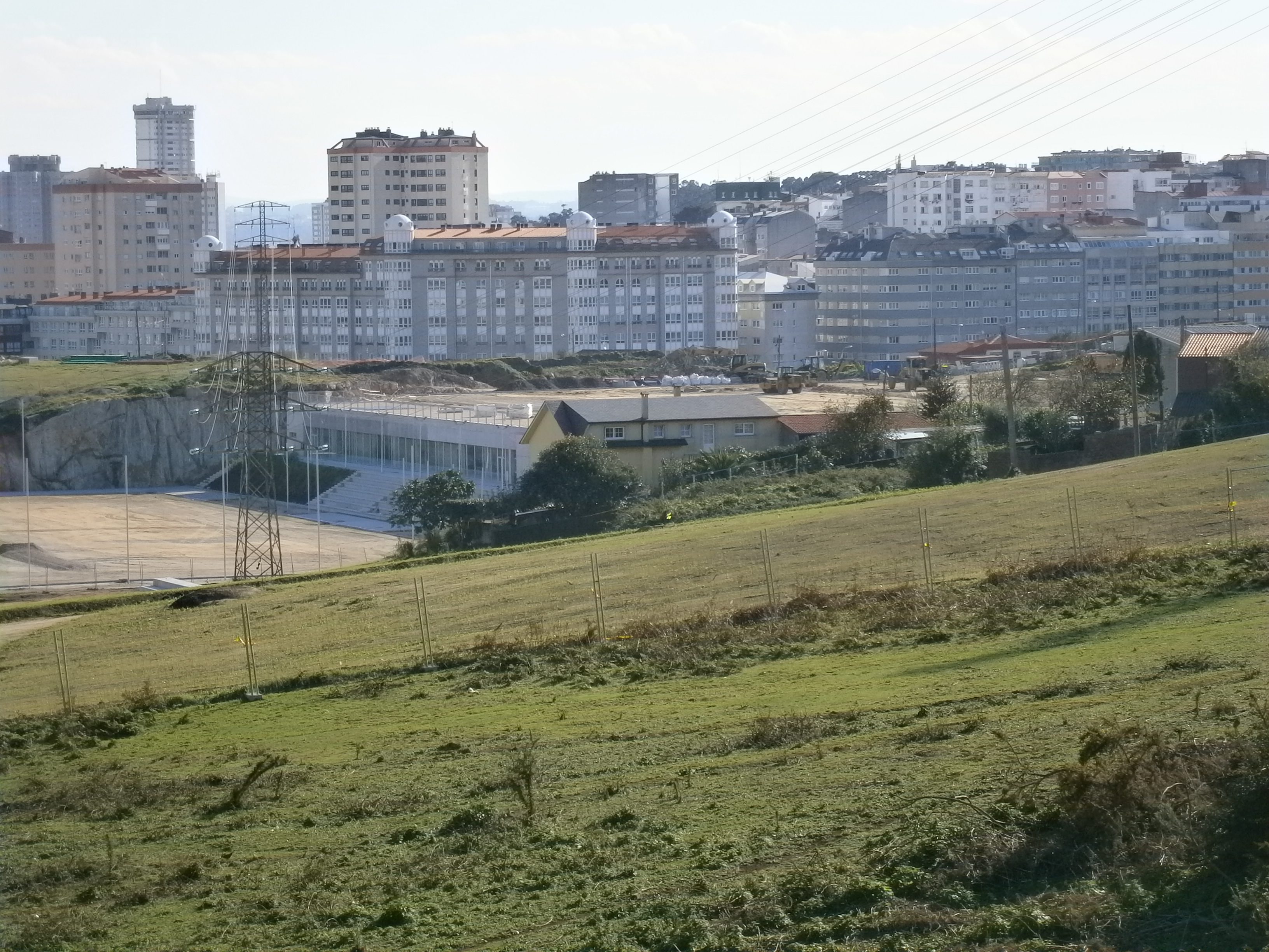 As Bouzas, Visma